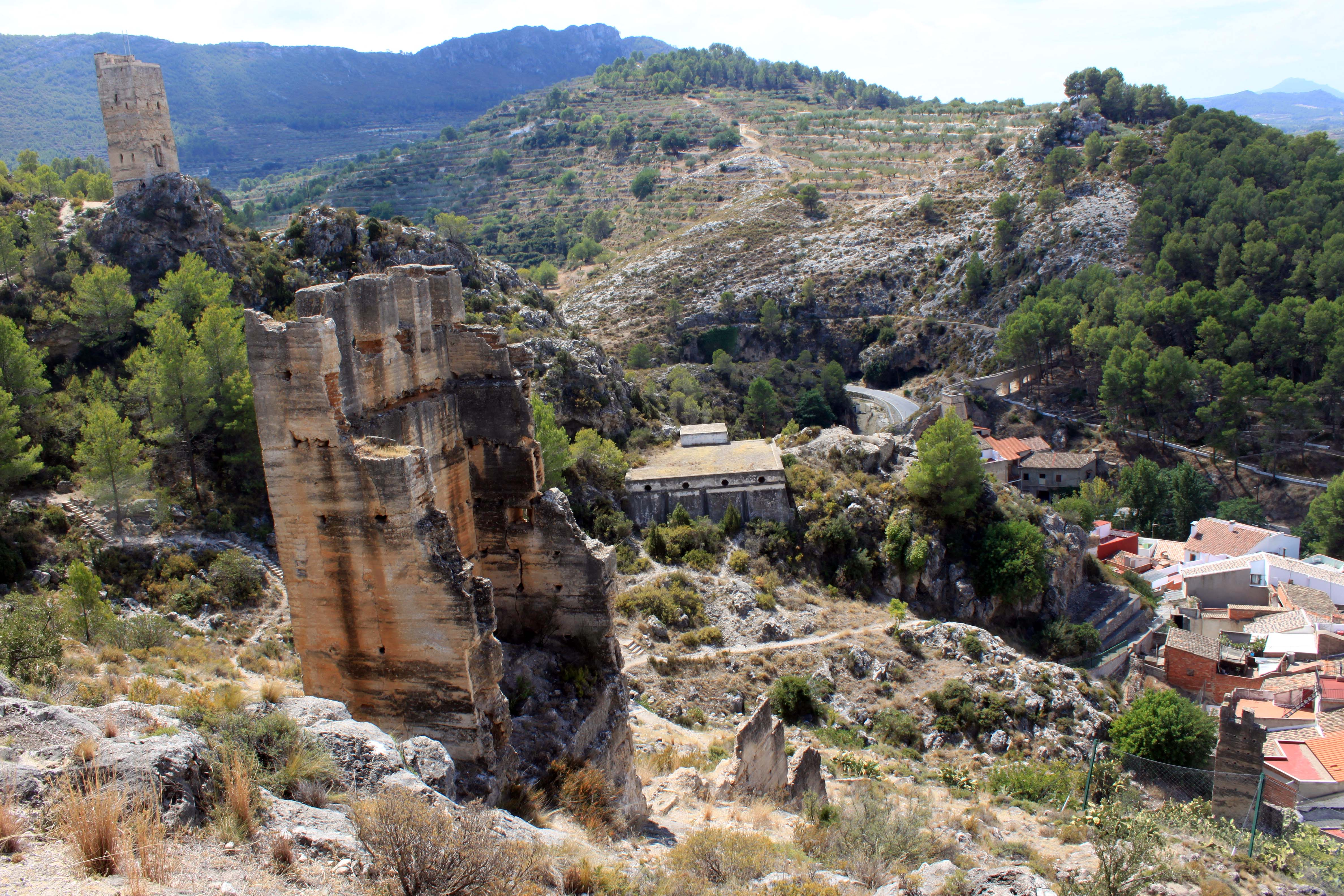 Vista de los restos del castillo de la localidad de Moixent, provincia de Valencia, Comunidad Valenciana, España.